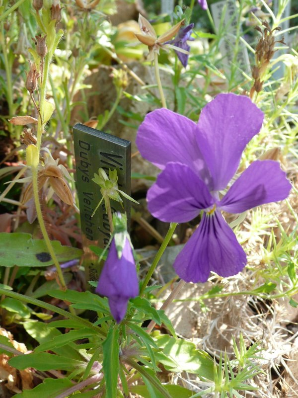 Viola dubayana, Botanischer Garten Erlangen, 2008